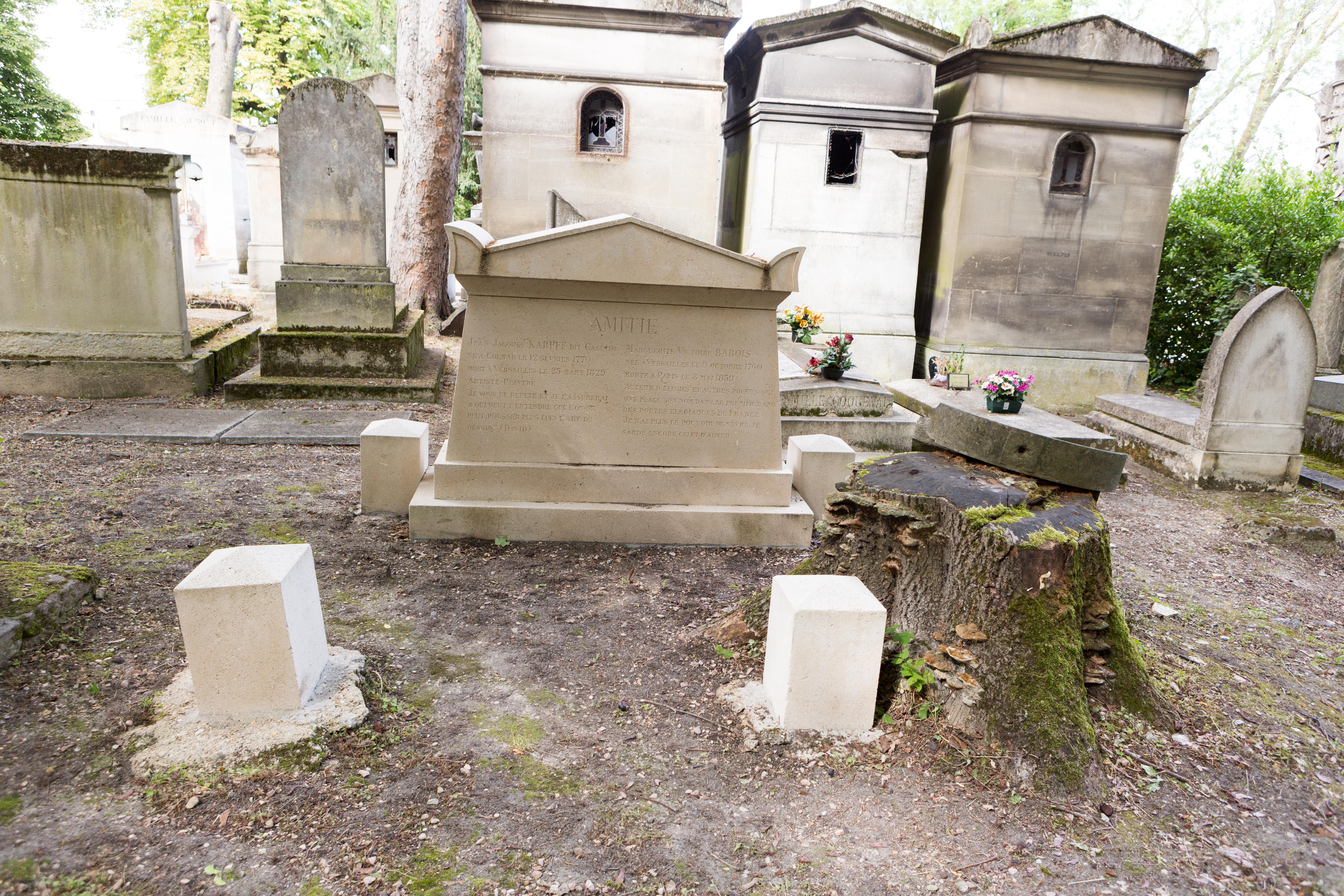 Sépulture de Jean-Jacques Karpff (1770-1829), dit Casimir, peintre miniaturiste et dessinateur ; Victoire Babois (1760-1839), femme de lettres française, auteure d'élégies et autres poésies qui ont placé son nom au premier rang des poètes élégiaques français.